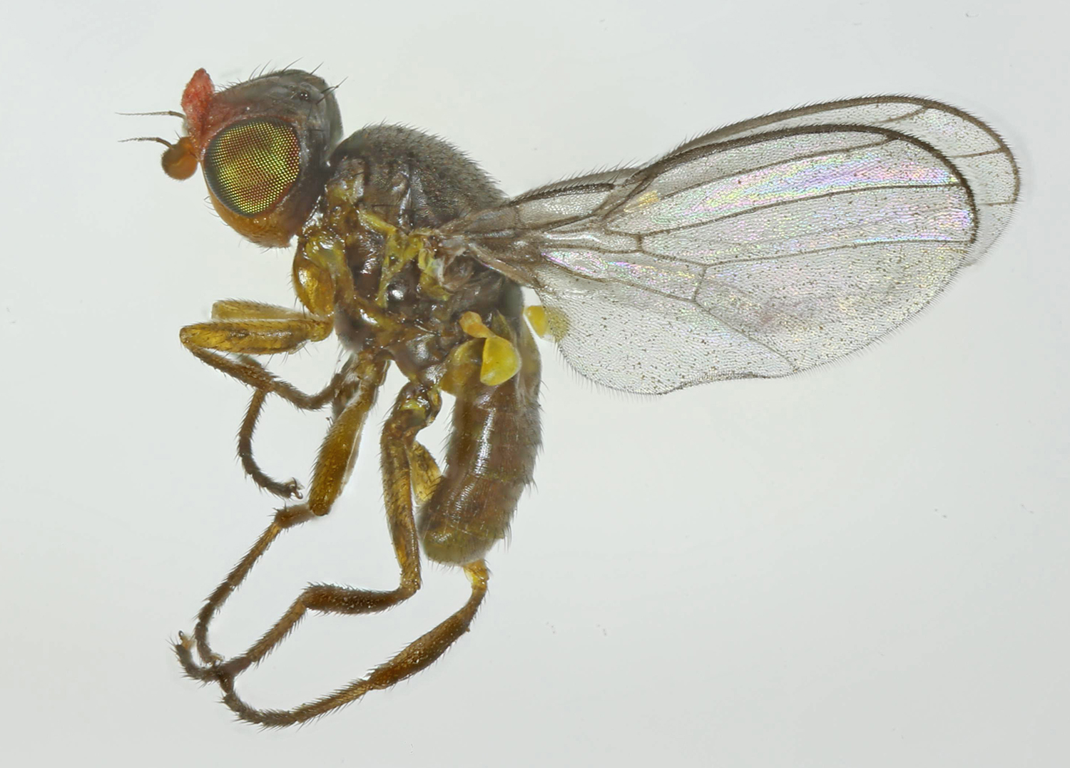 Dicraeus vagans, Deeside, North Wales, June 2015